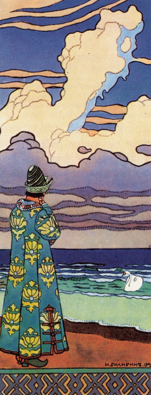 обложка "Сказка о царе Салтане"